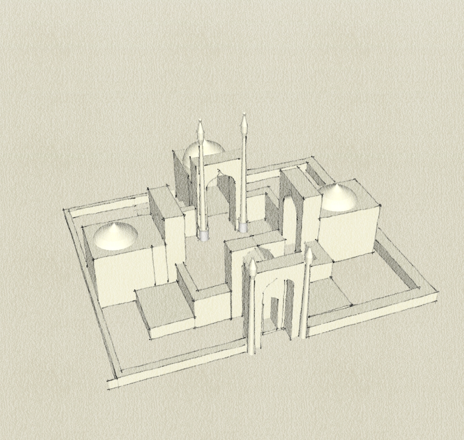 Persian four-iwan mosque